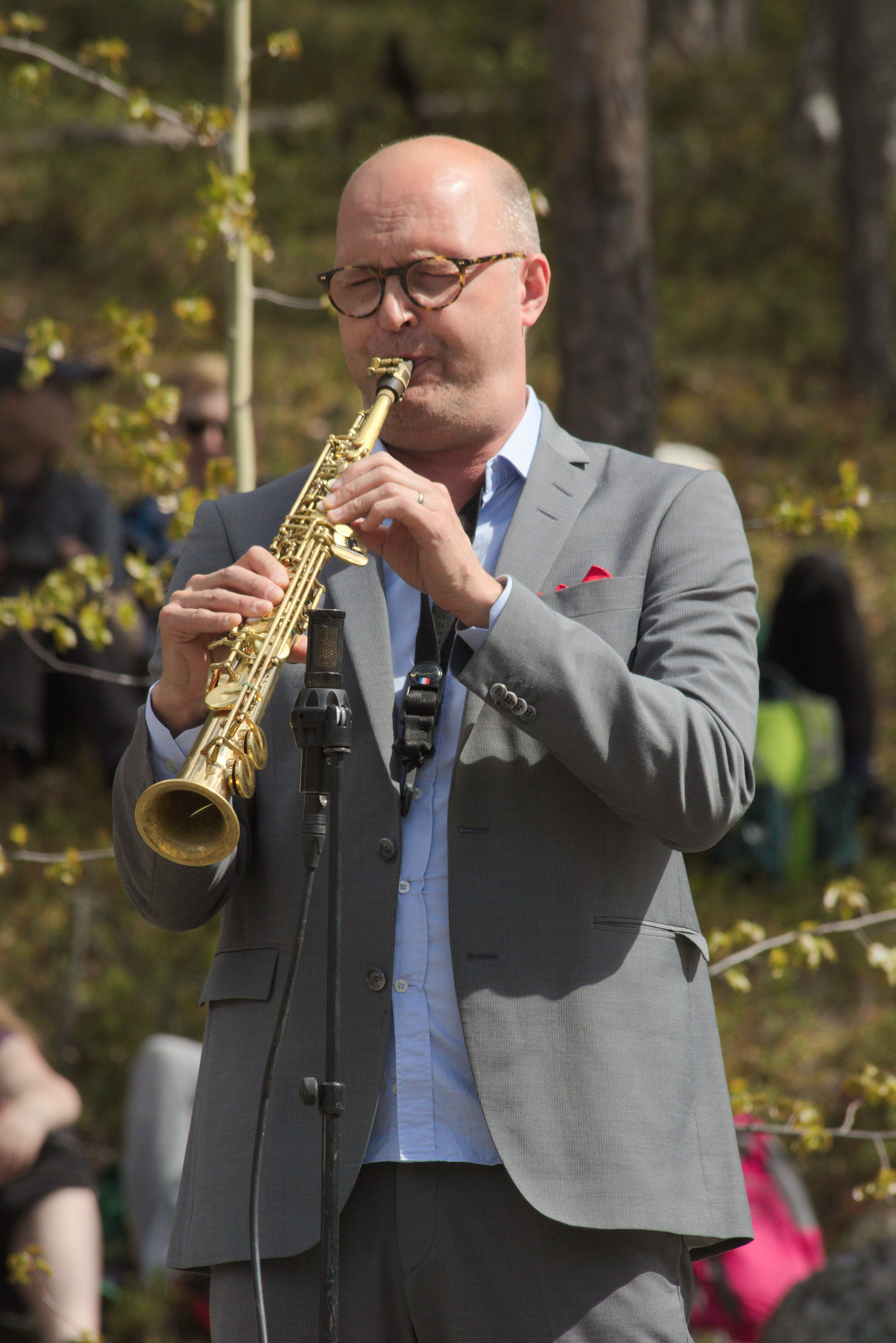 Jonas Knutsson under invigningen av Björnlandets utvidgade nationalpark